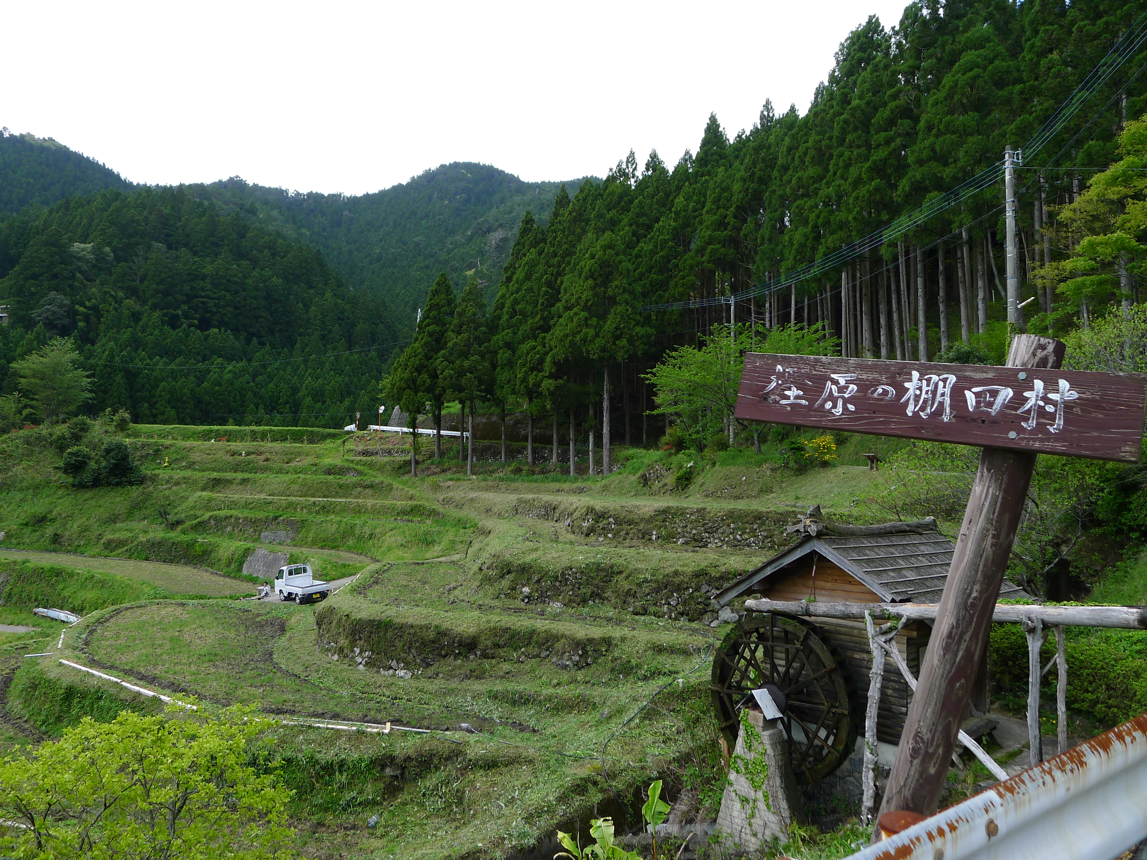 重要文化的景観選定「樫原の棚田」（徳島県上勝町）